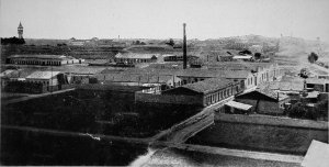 Vista aèria del vapor d'en Cusidó, Sabadell, 1921 (autor desconegut). Extreta del Libro de oro del comercio... 1921, p. 489